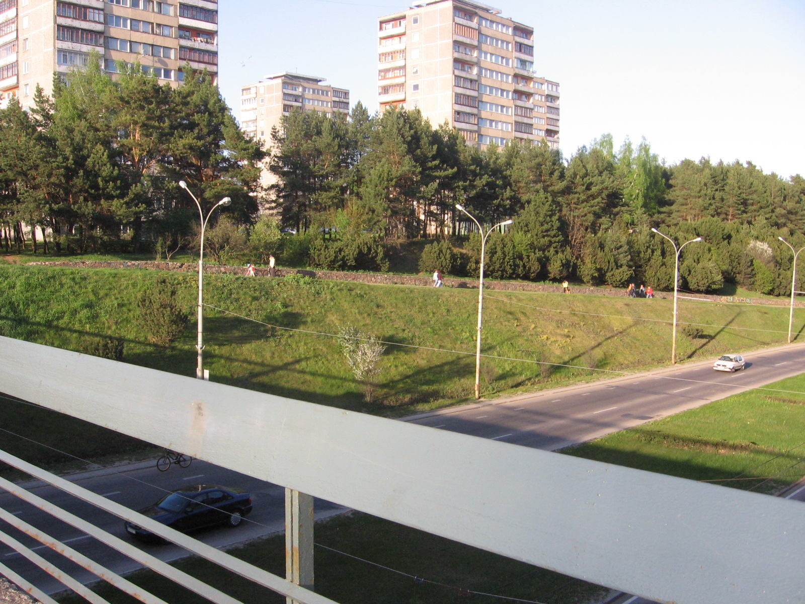 Лаздинай